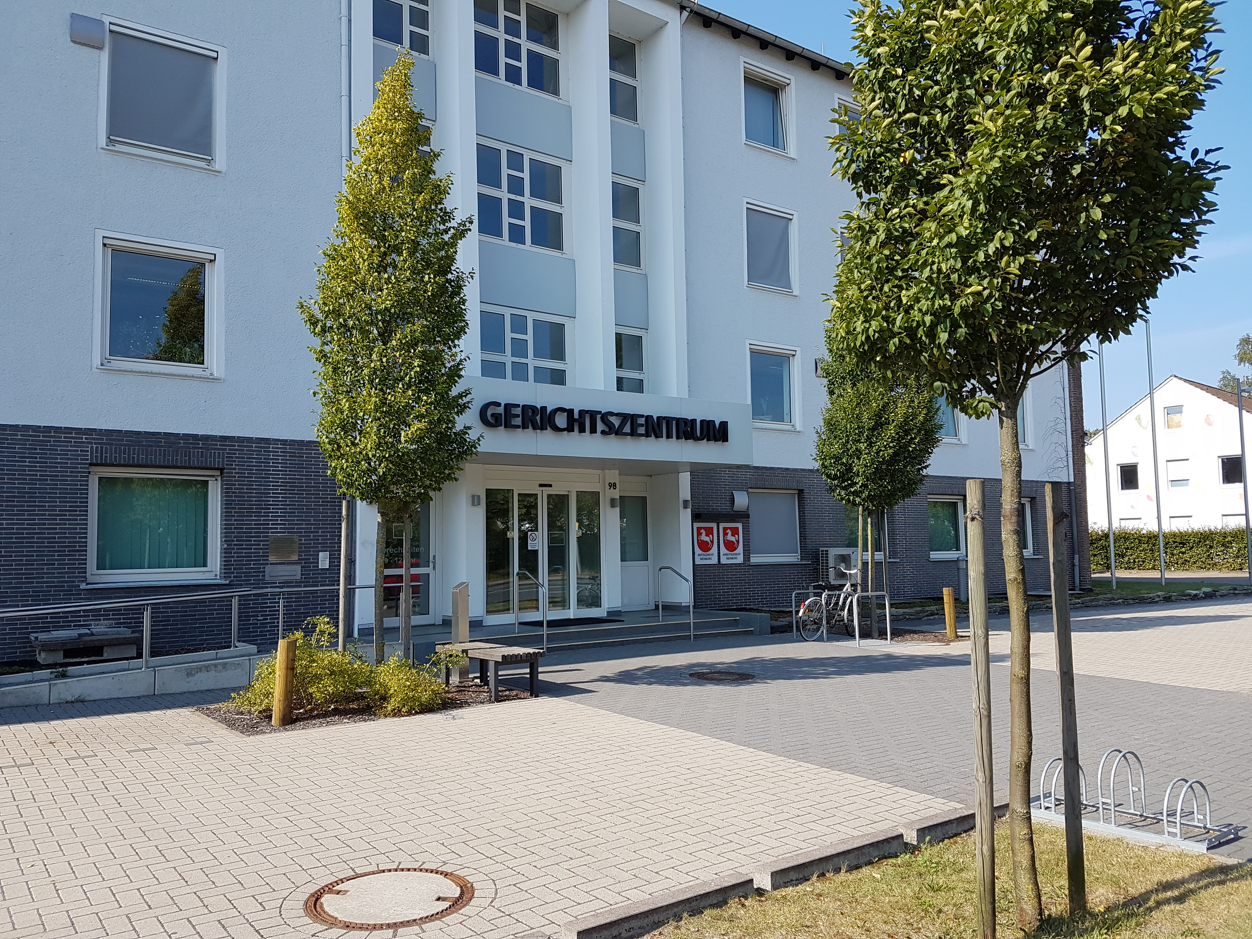 Gerichtszentrum Nienburg (Amtsgericht und Arbeitsgericht)